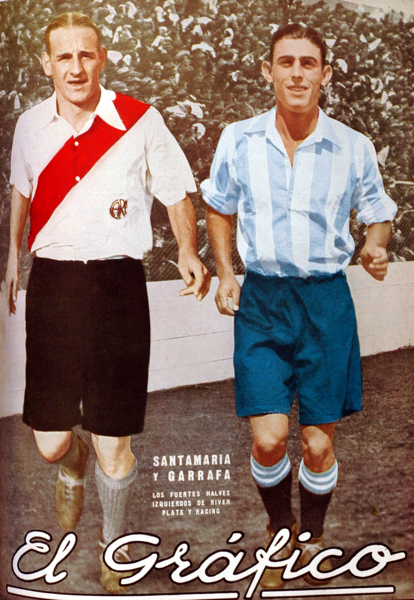 El Grafico del 08 de Abril de 1933. Edicion 717